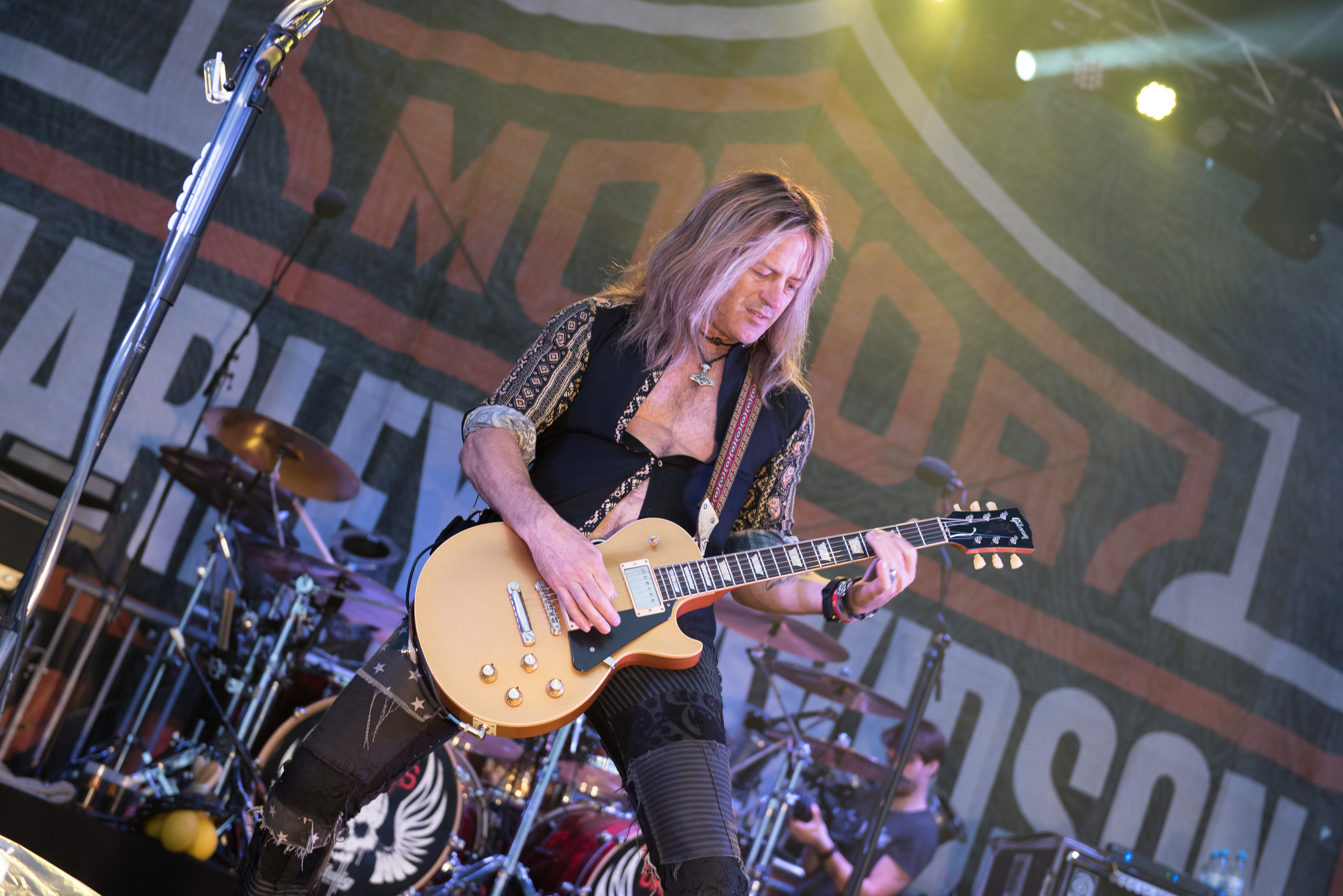 The Dead Daisies bei den Hamburg Harley Days 2017